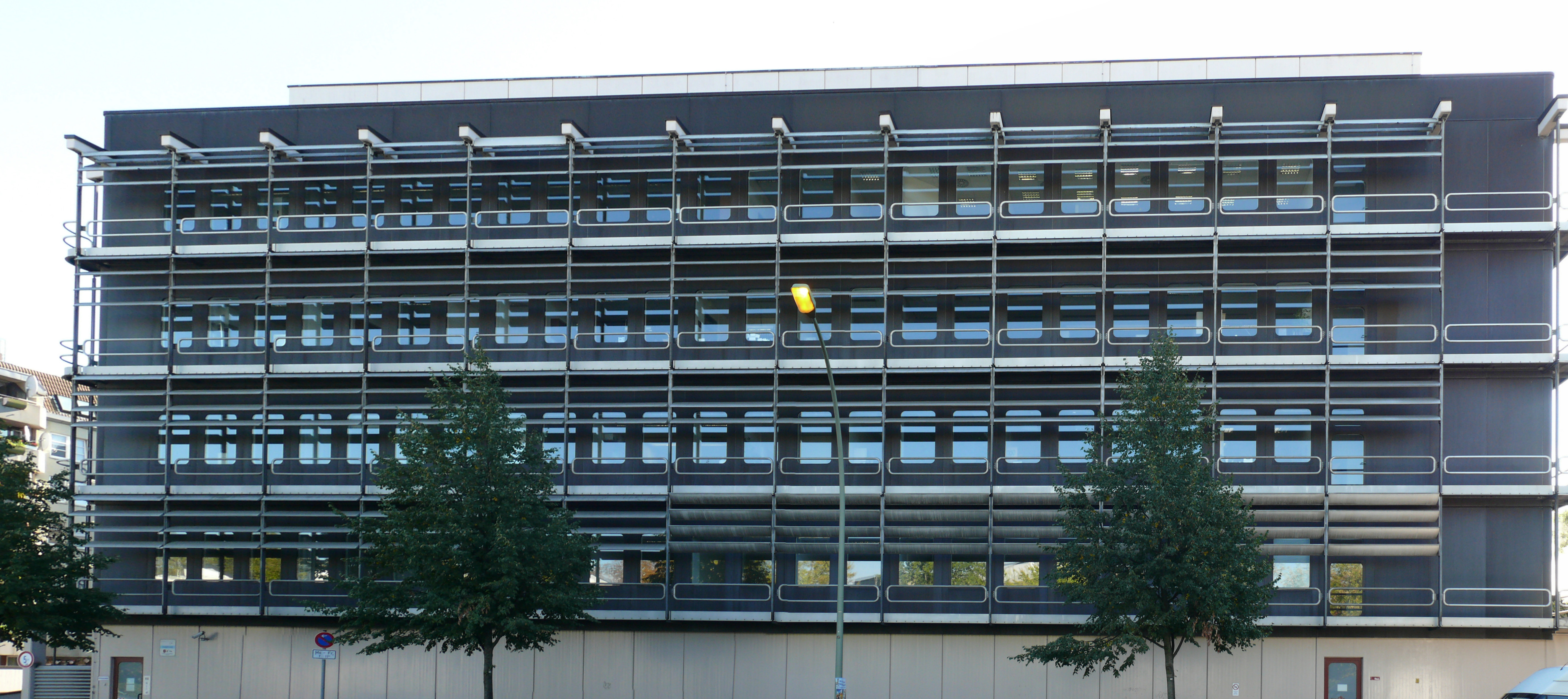 Wedding Föhrer Straße RKI Neubau